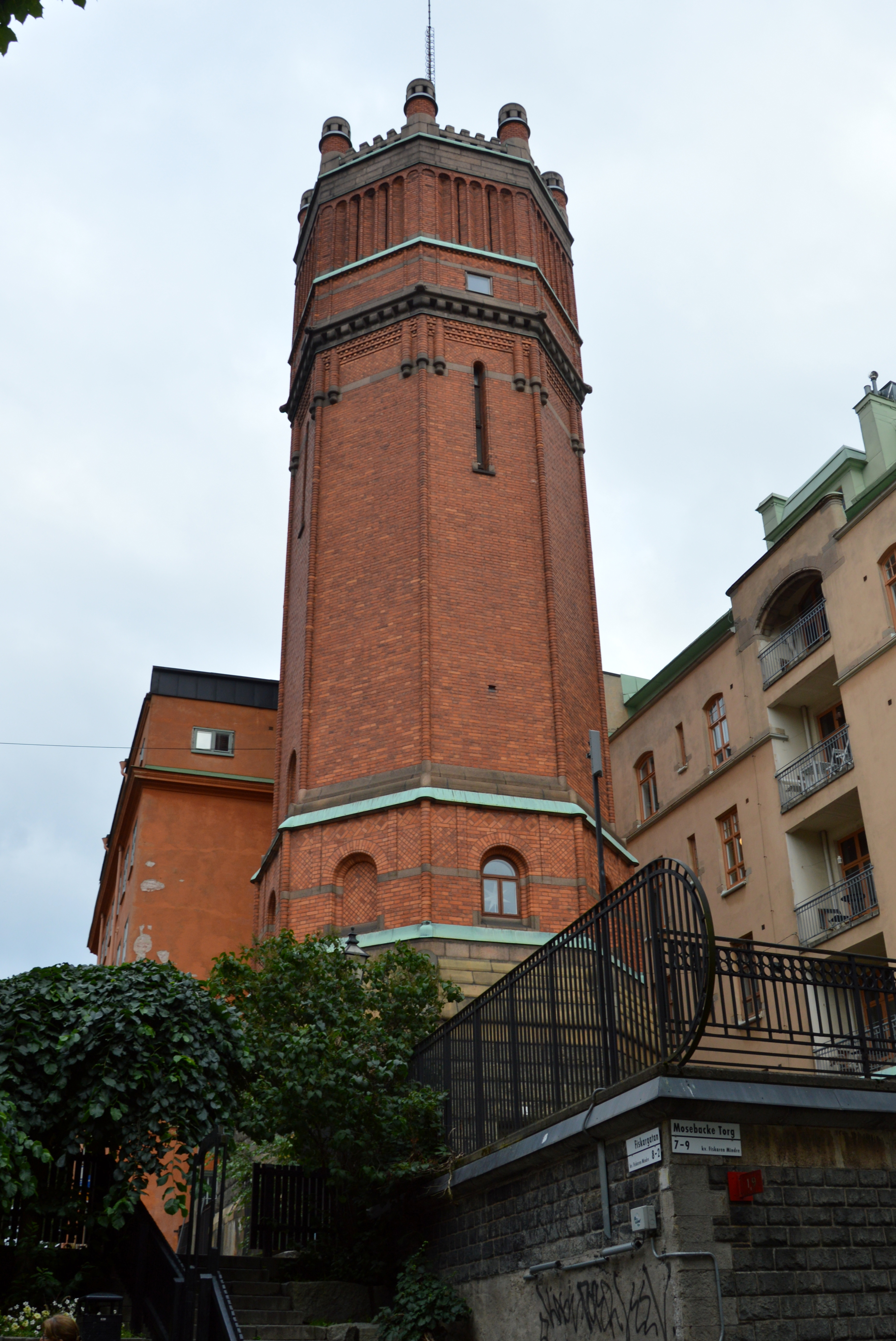 Wsserturm Mosebacke in Södermalm, Stockholm